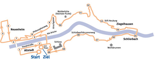 Aktueller Steckenverlauf des SAS Halbmarathons der TSG 78 Heidelberg